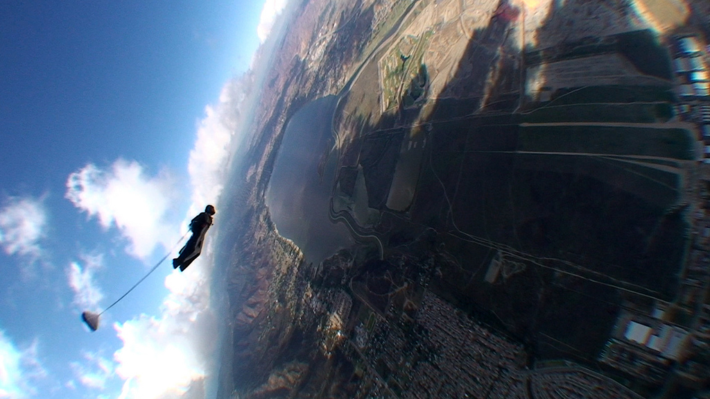 Pilot Chute Deployment